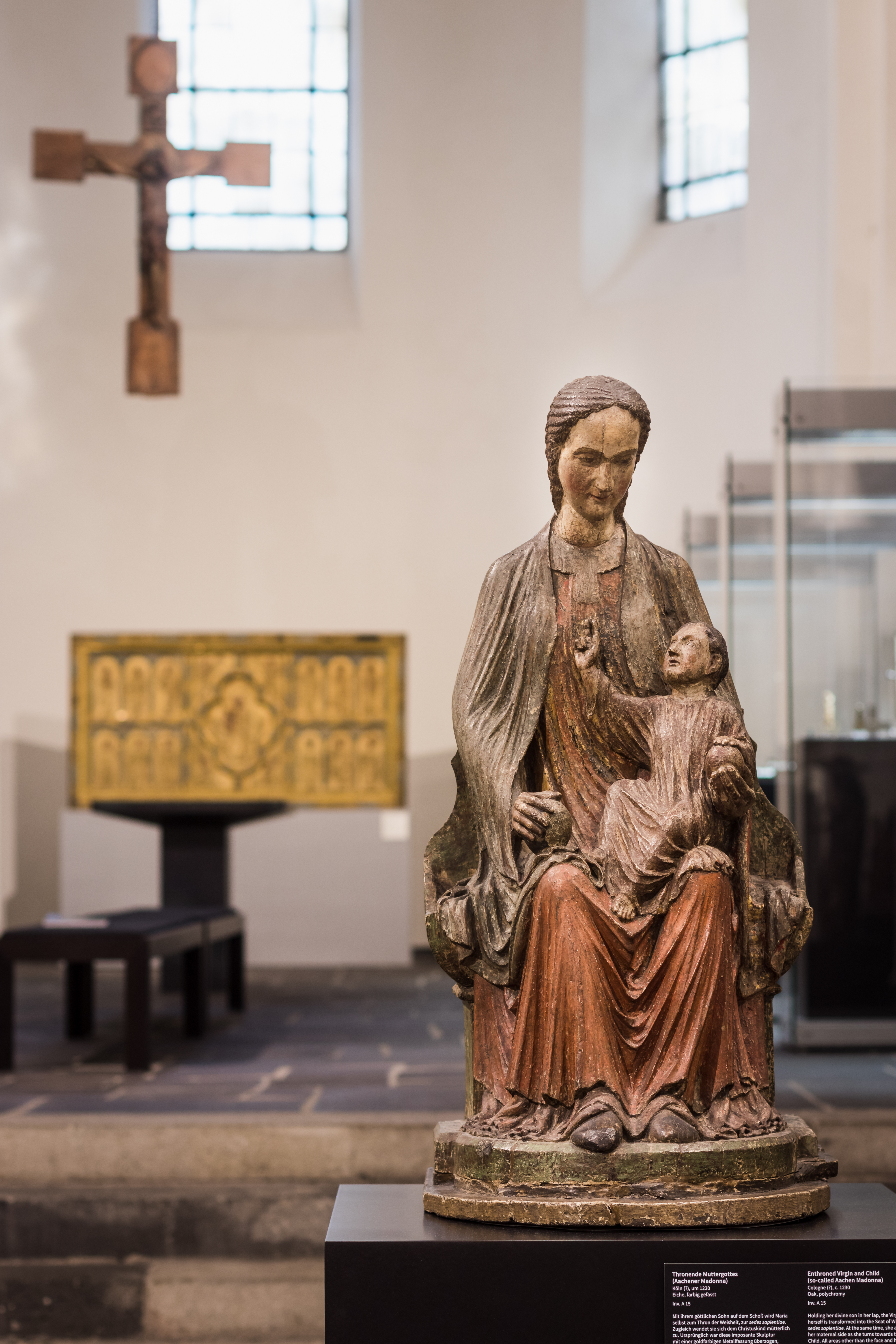 Museum Schnütgen, Köln, Aachener Madonna